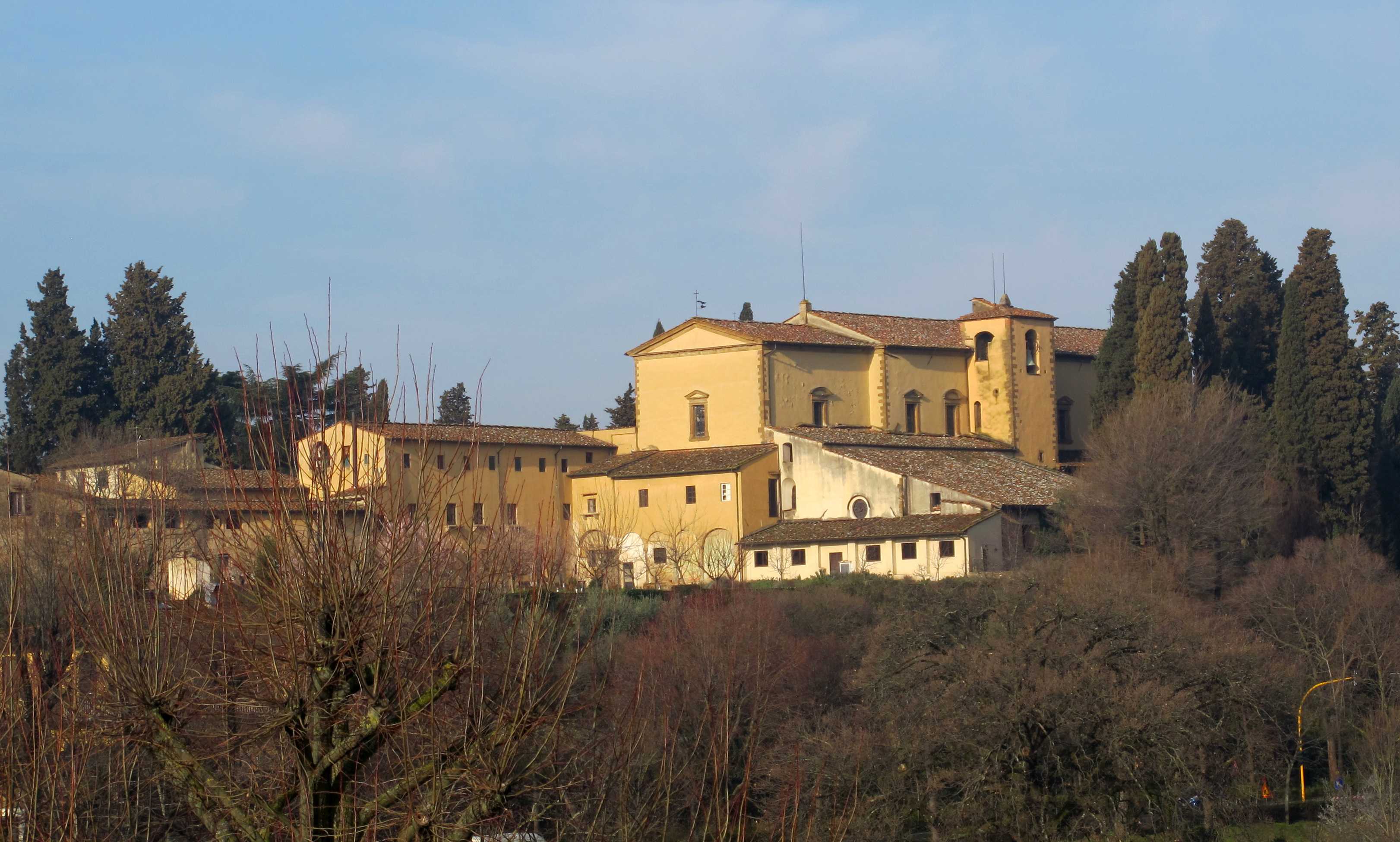 Villa la vedetta, vista 12 san salvatore